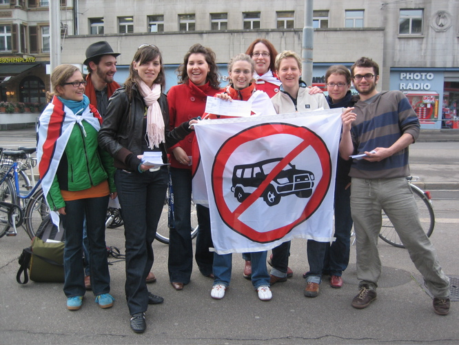 Junge Grüne Basel während einer Stopp-Offroader Aktion.